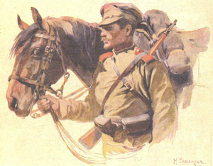 «В Галиции. Кавалерист» акварель Николая Самокиша «В Галиции. Кавалерист»